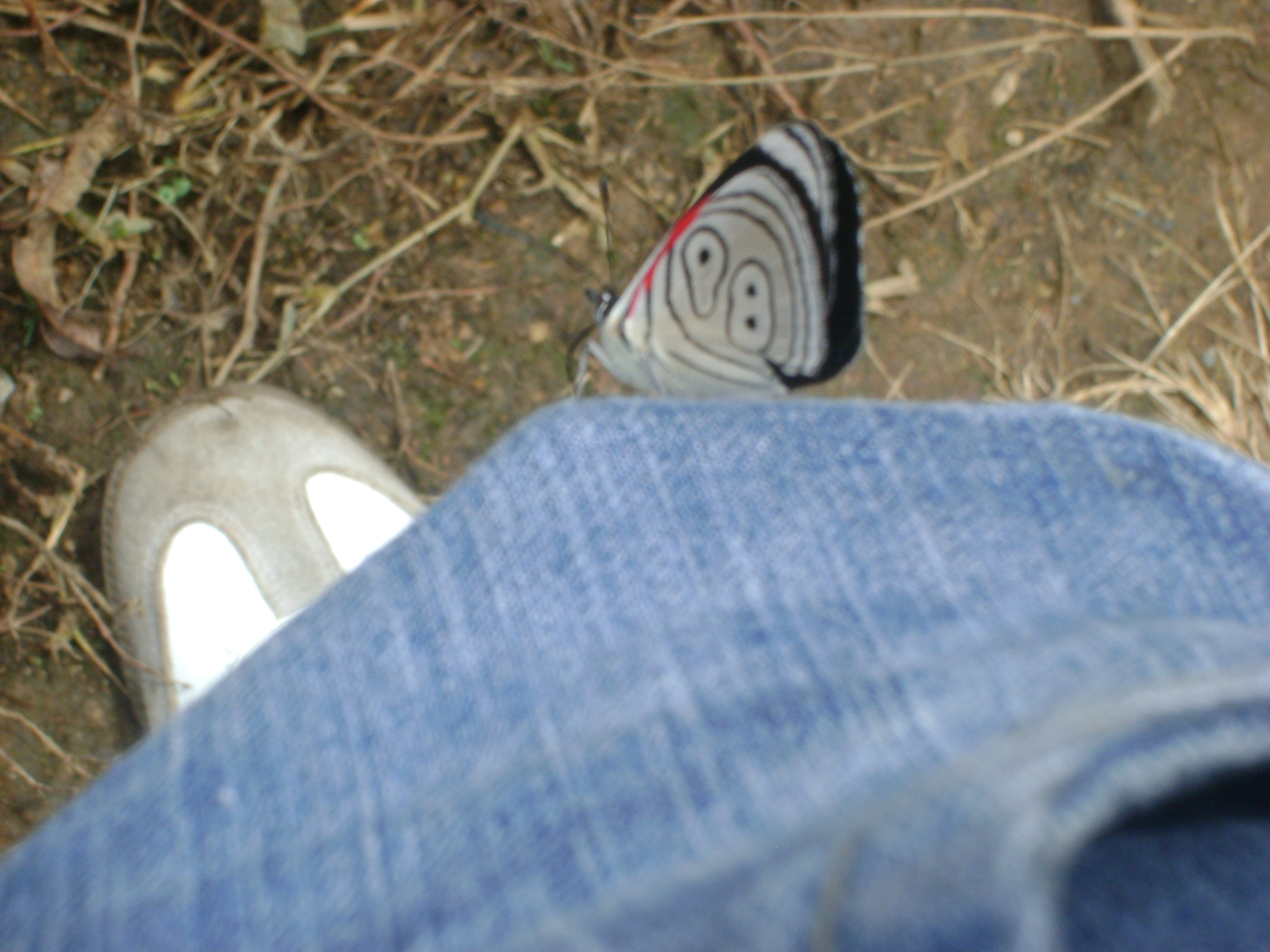 Especie de mariposa en la parroquia El Goaltal